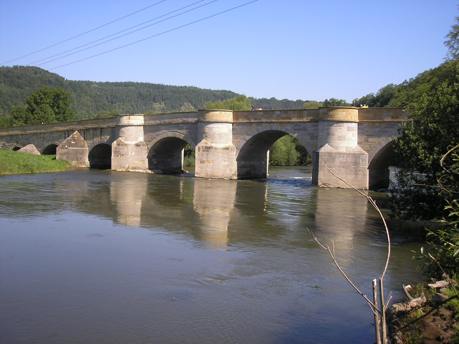 Die Werrabrücke in Creuzburg (Thüringen).